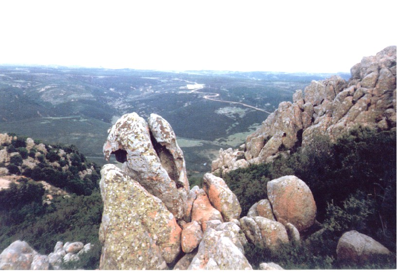 figura scolpita dagli agenti atmosferici: sembra un'aquila, donde il nome; vi assicuro che, se salite a monte Genis, è ancora più bella. Sulla sinistra dell'immagine, si scorge la radura su cui si trova il nuraghe di cui parlo nel testo su Villasalto.